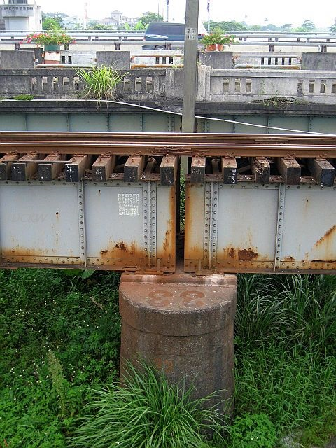 台鐵宜蘭線第二代濁水溪橋(舊蘭陽大橋_1934) was filmed by TDCKW on 20060616